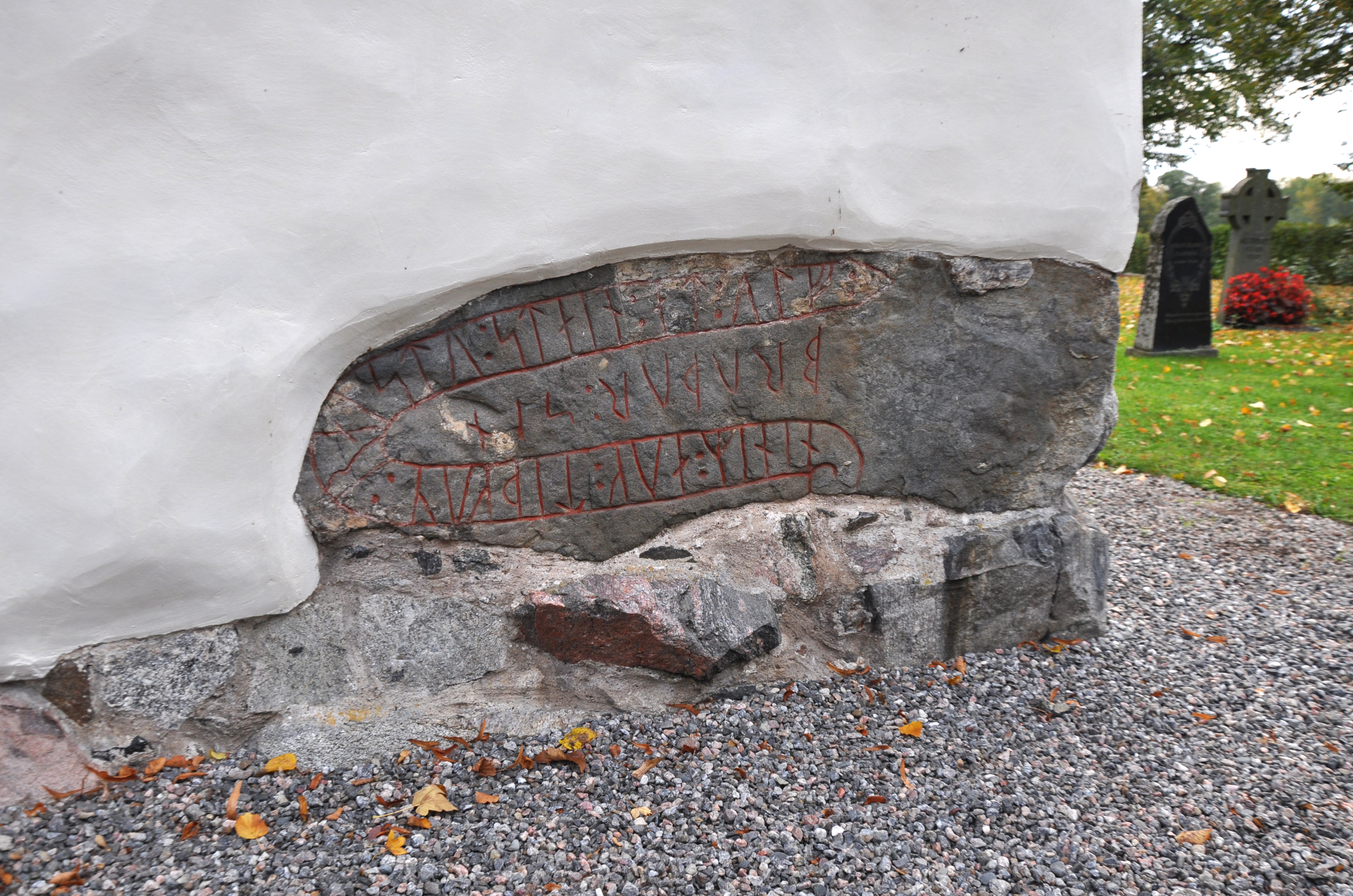 Runsten Sö 75, inmurad i Vrena kyrka, Södermanland, Sverige.